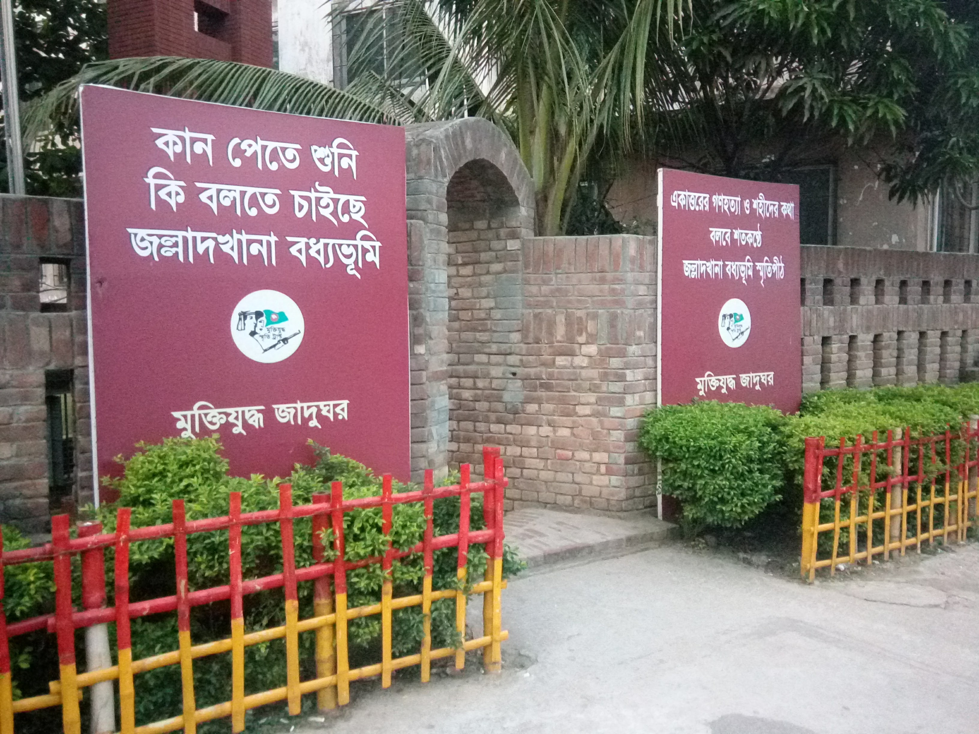 জল্লাদখানা বধ্যভূমির সম্মুখভাগ